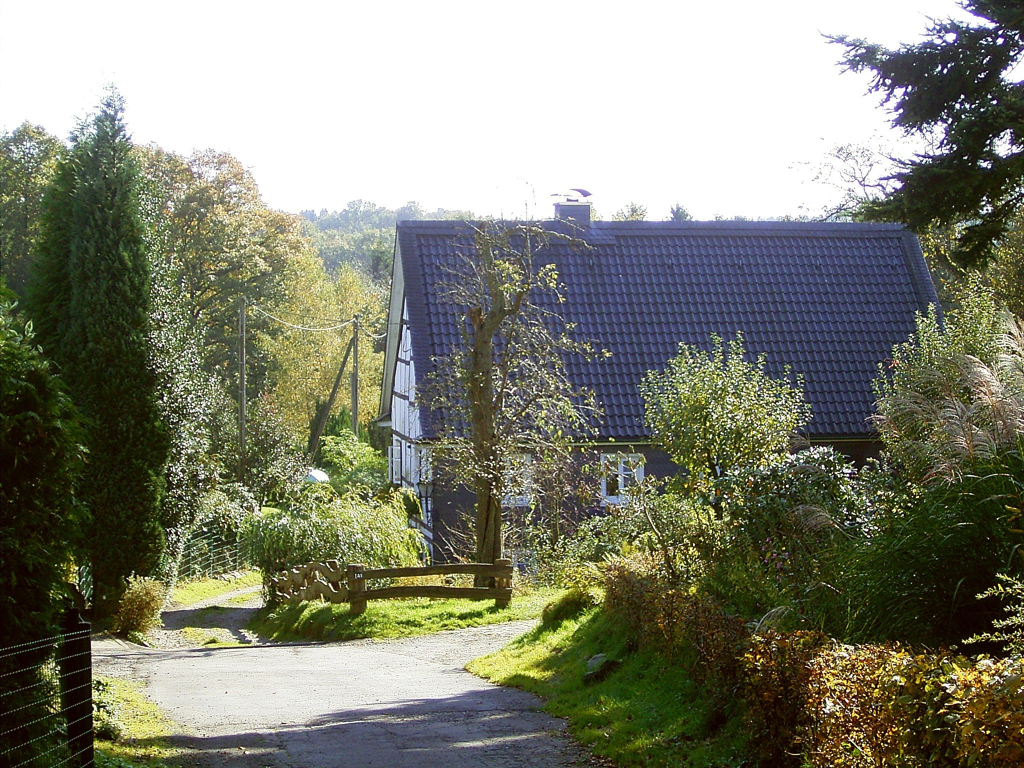 Radevormwald